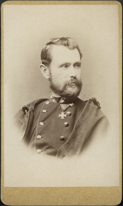 Theodor Braumüller von Tannbruck (1829 - 1904), österreichischer General und Feldzeugmeister und MItglied des Herrenhauses